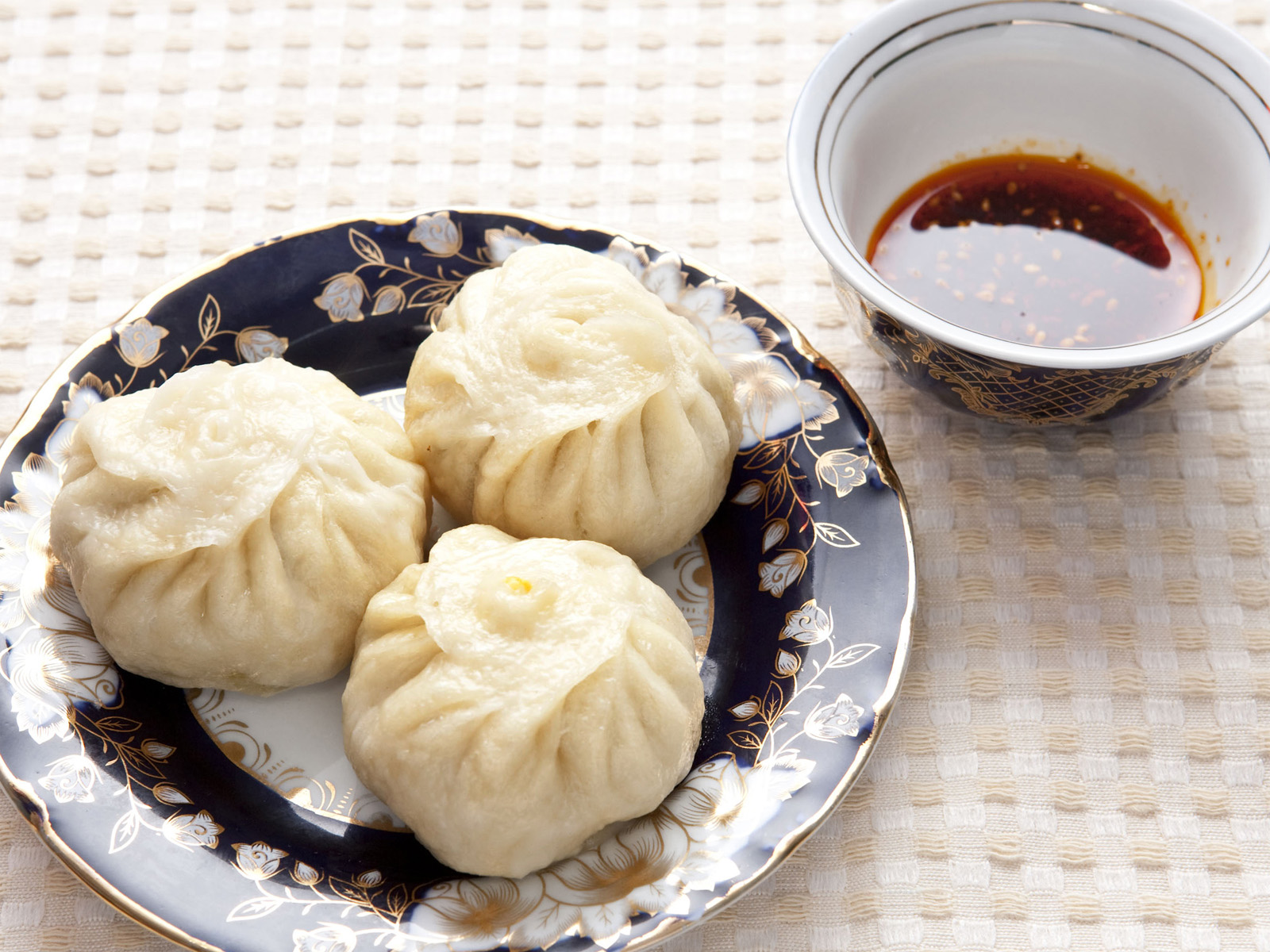 マンタ。シルクロード・タリム（東京）調理。